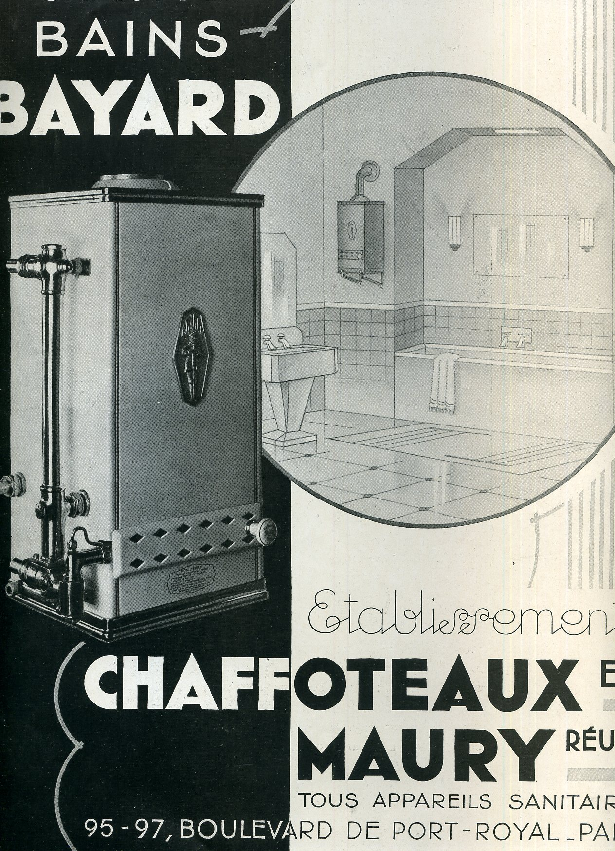 Bains Bayard, Ets. Chaffoteaux et Maury, tous apareils sanitaires, 95-97 Boulevard de Port-Royal, Paris.